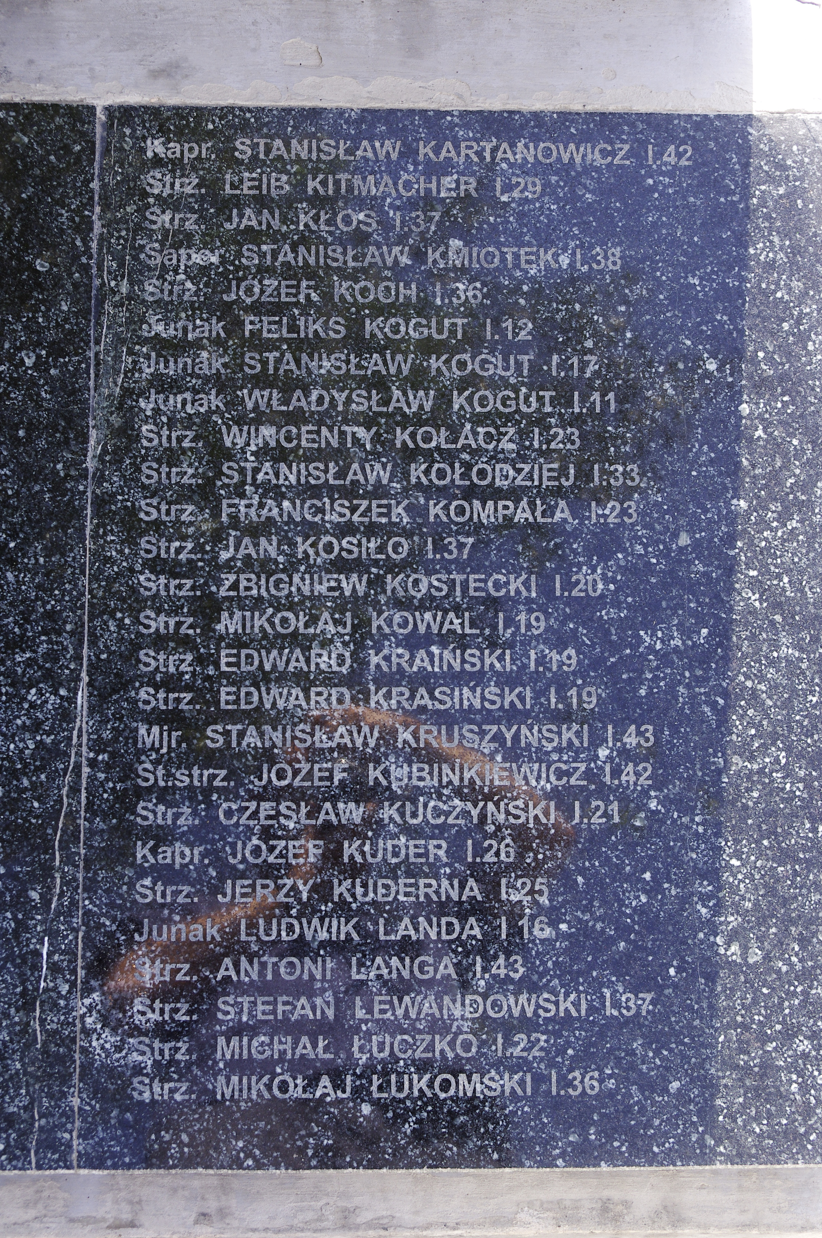 The making of this document was supported by Wikimedia Polska. To zdjęcie zostało wykonane podczas Wikiwyprawy 2015.Wszystkie zdjęcia z wyprawy możesz zobaczyć w kategorii: Wikiwyprawa 2015. English | polski | +/− To zdjęcie zostało załadowane dzięki współpracy z firmą Hyperbook. polski | +/− To zdjęcie zostało załadowane dzięki współpracy z firmą: Kopex Group. English | polski | +/−